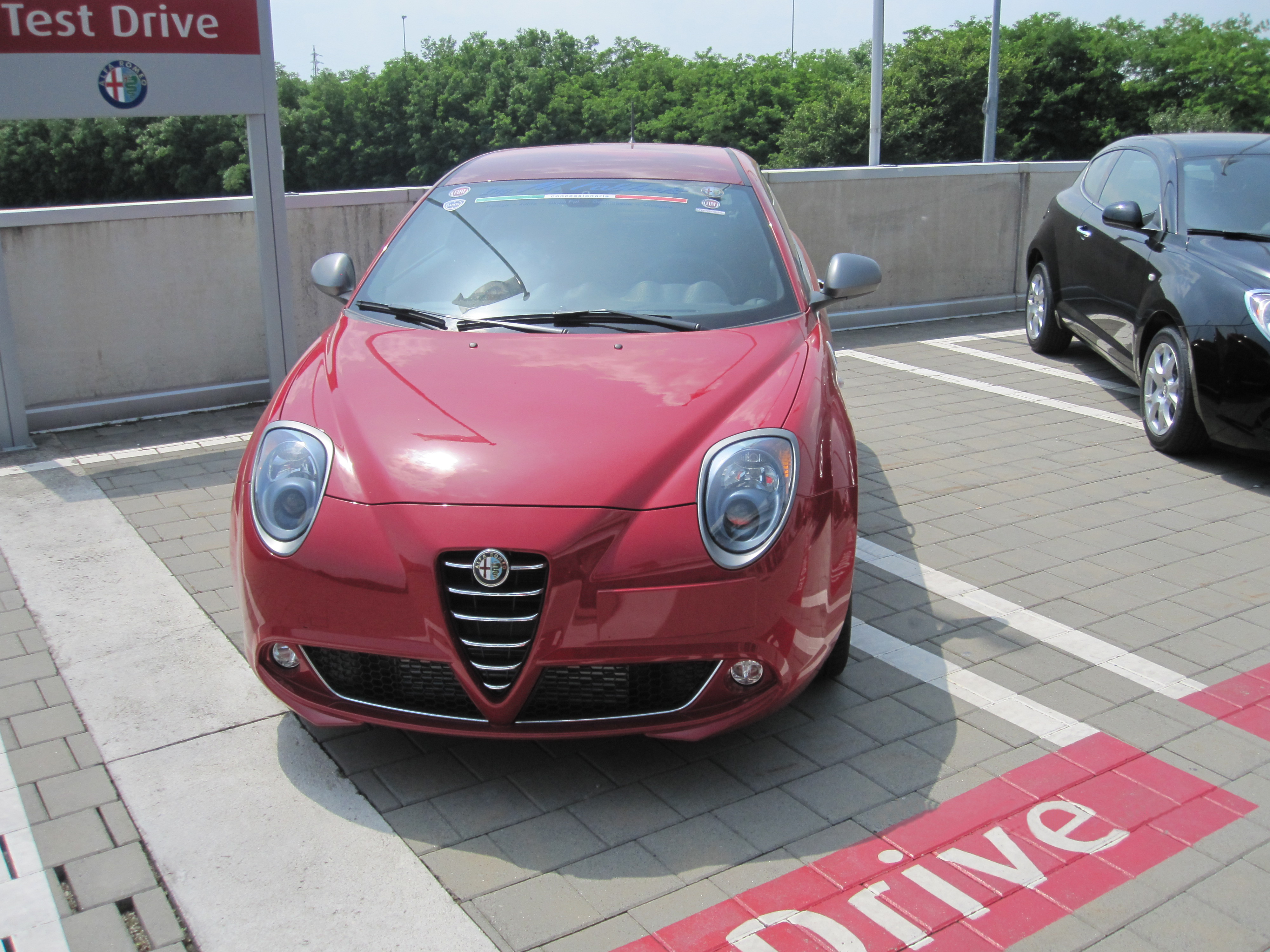 Test Drive MiTo